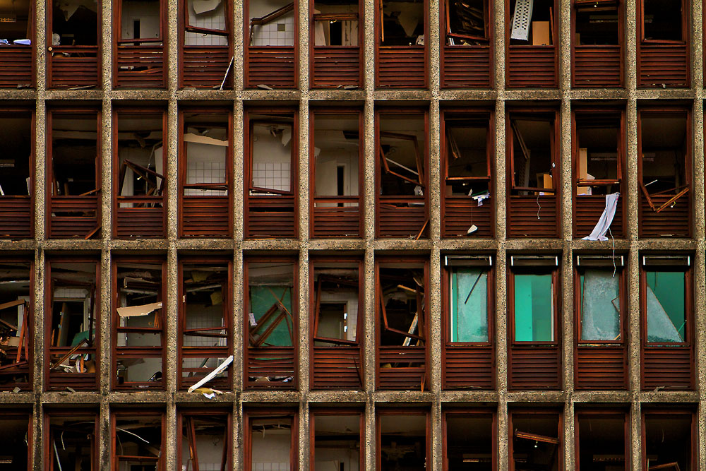 Høyblokken etter terrorangrepet 22. juli 2011